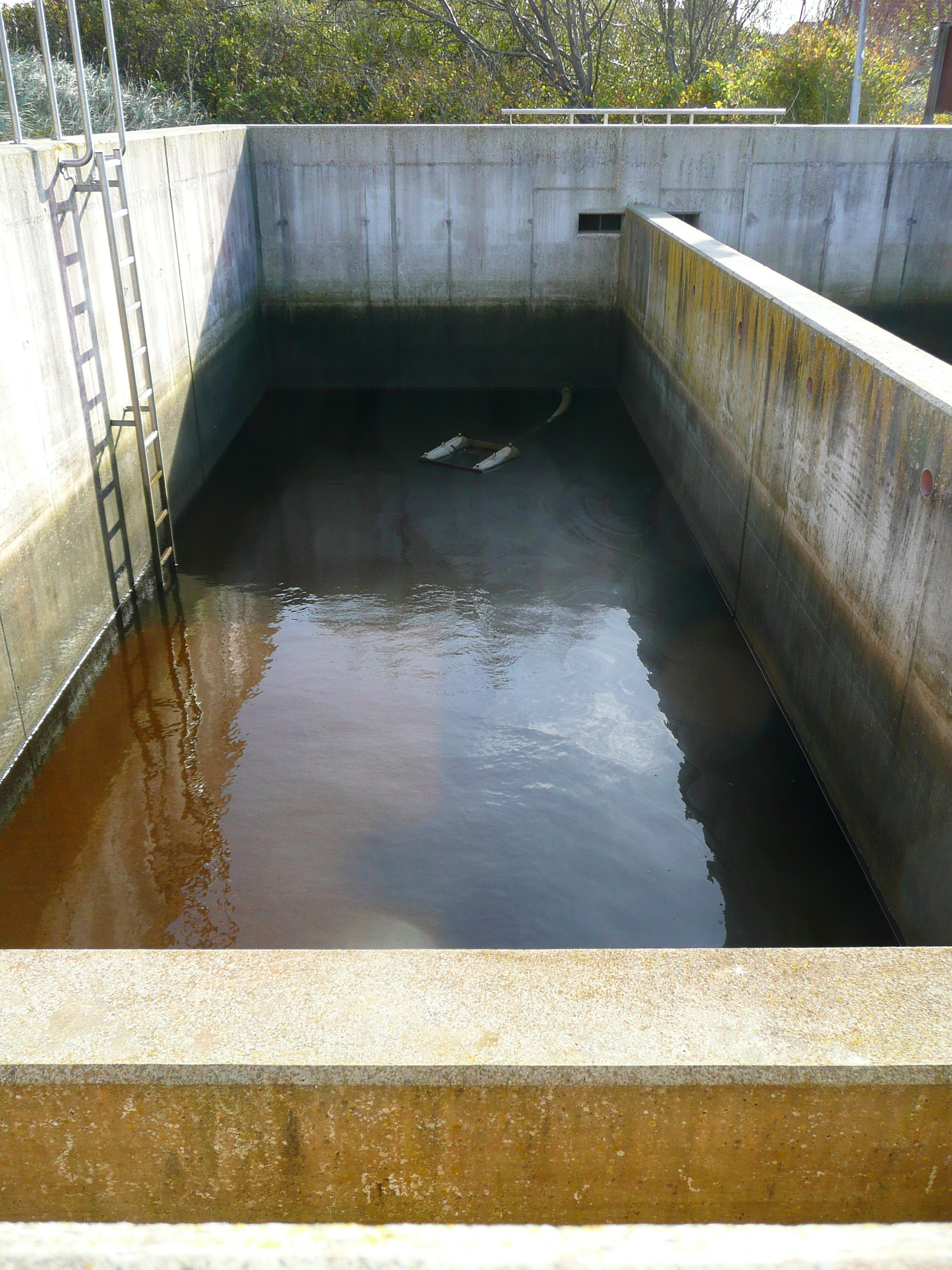 Absetzbecken für Eisen- und Manganschlamm im Wasserwerk auf der ostfriesischen Nordseeinsel Juist (Niedersachsen, Deutschland)